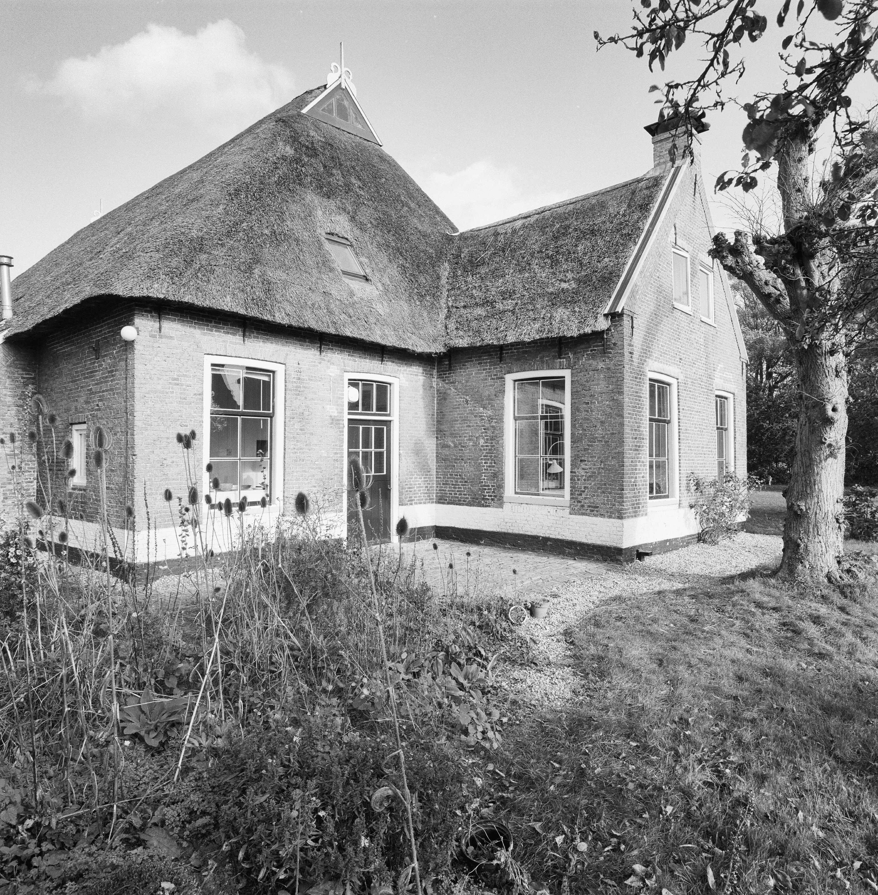 Boerderij: Exterieur VOORGEVEL